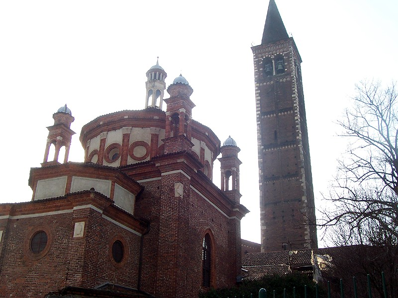 Cappella Portinari e Campanile della Basilica di Sant'Eustorgio a Milano.